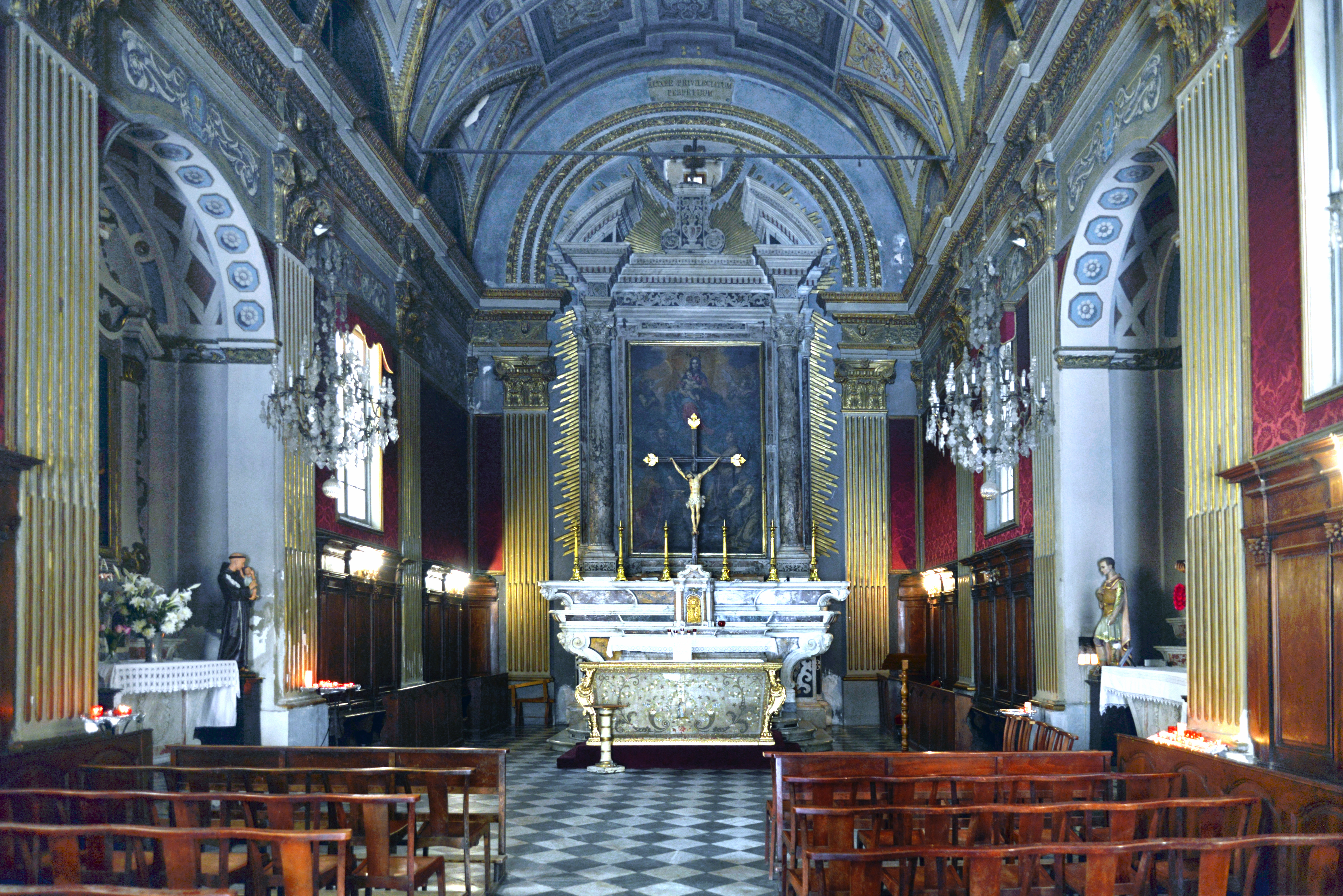 Bastia, Corse (France) - Intérieur de l'église ou oratoire Saint-Roch classée, rue Napoléon.